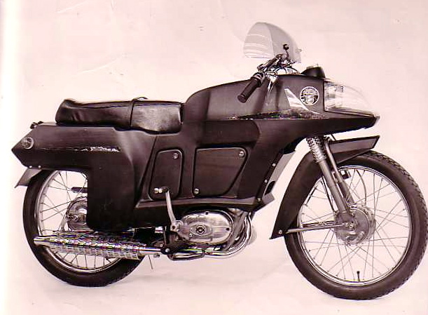 Carrosserie de moto/cyclo en polyéthylène thermoformé, par Pierre Ciraud - 1965.